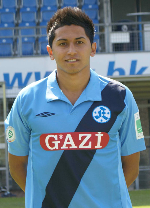 Ali Pala im Trikot der Stuttgarter Kickers